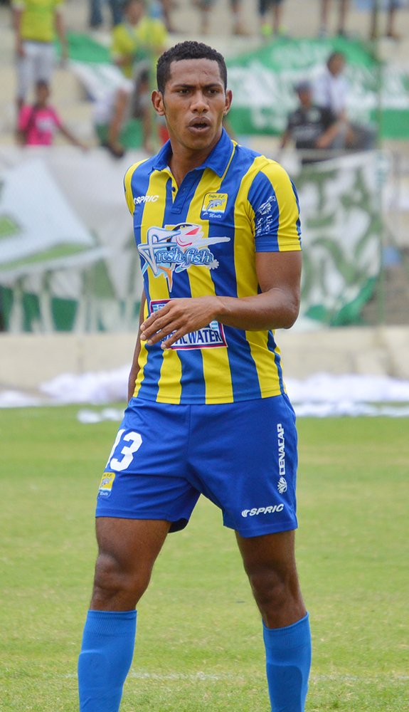 Duval Valverde en clásico manabita con la camiseta de Delfín SC